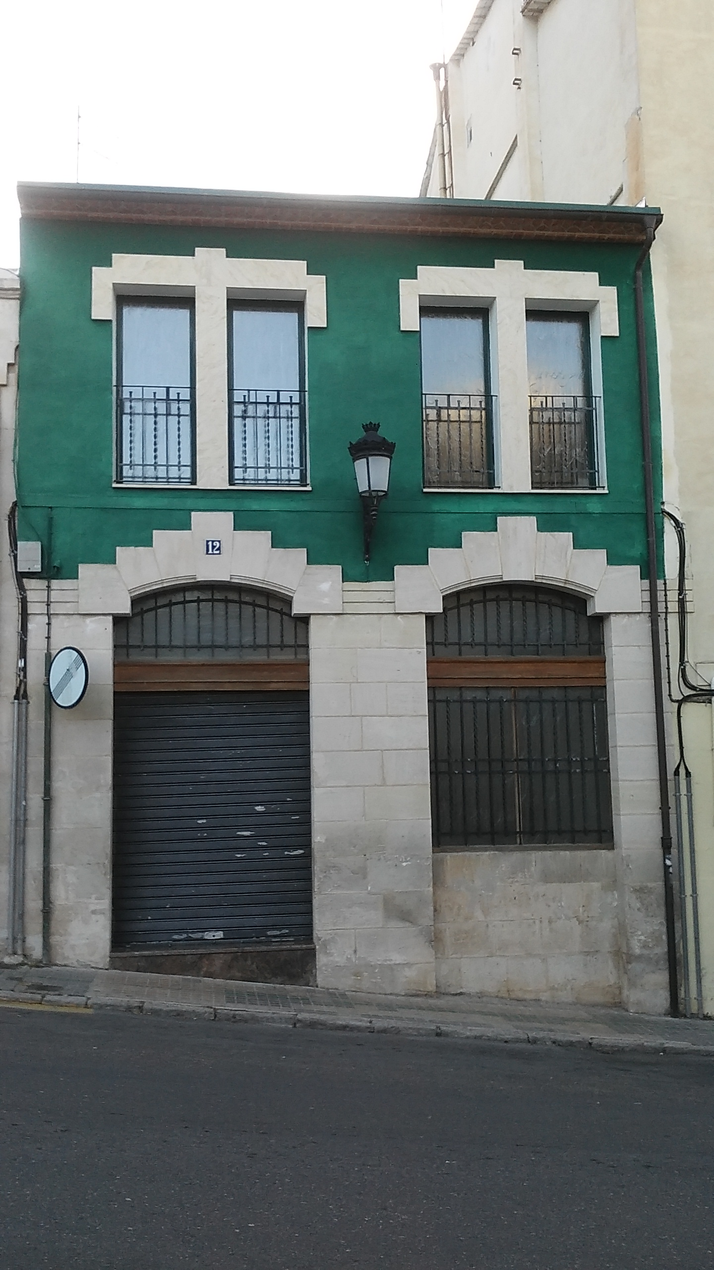 Fabrica i casa en el carrer Sant Vicent Ferrer número 12 d'Alcoy. Obra modernista de Timoteo Briet Montaud, any 1915.